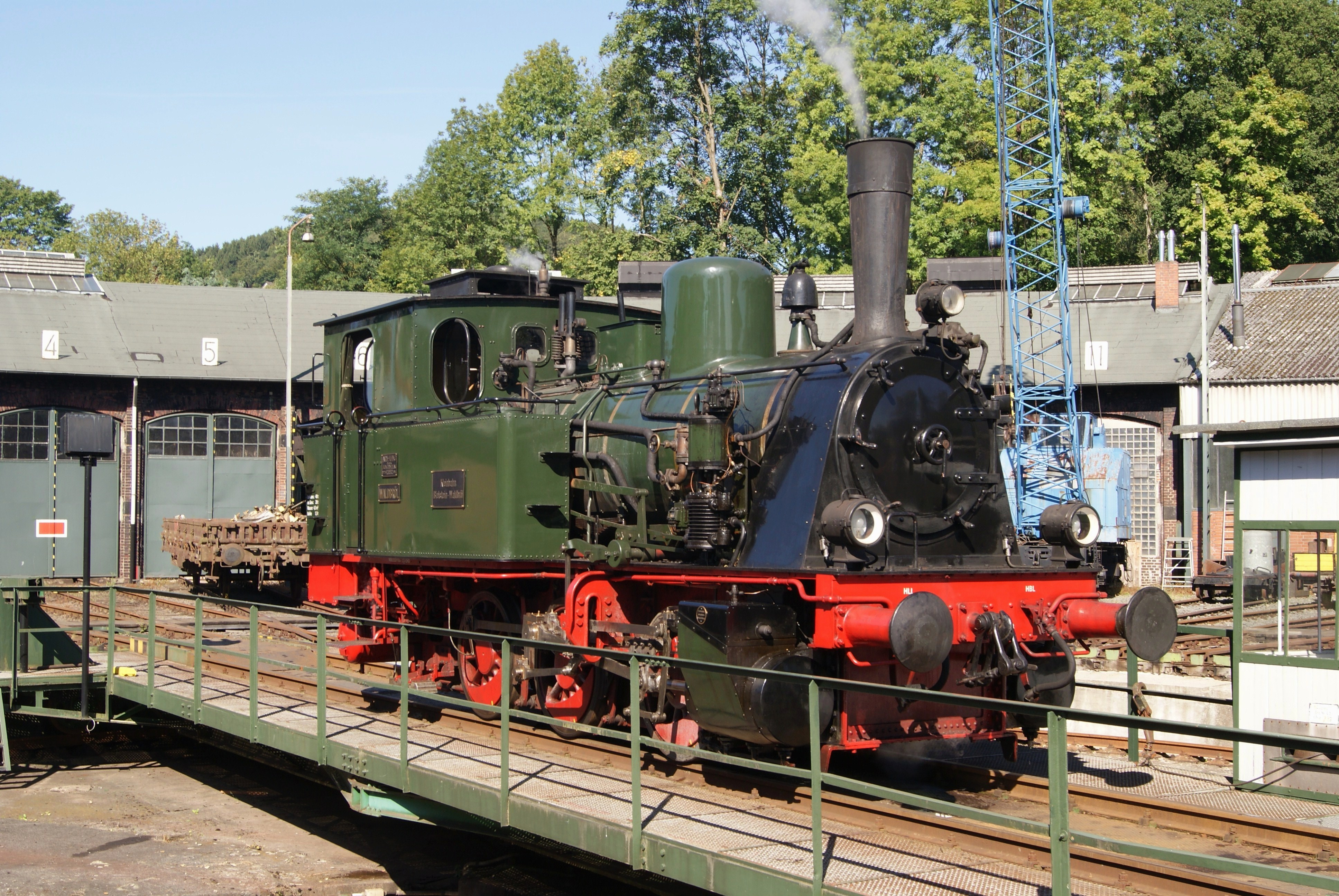 Die Dampflok "Waldbröl" (Jung, Baujahr 1914, ex Kleinbahn Bielstein-Waldbröl) unter Dampf auf der Drehscheibe des Eisenbahnmuseums Dieringhausen.